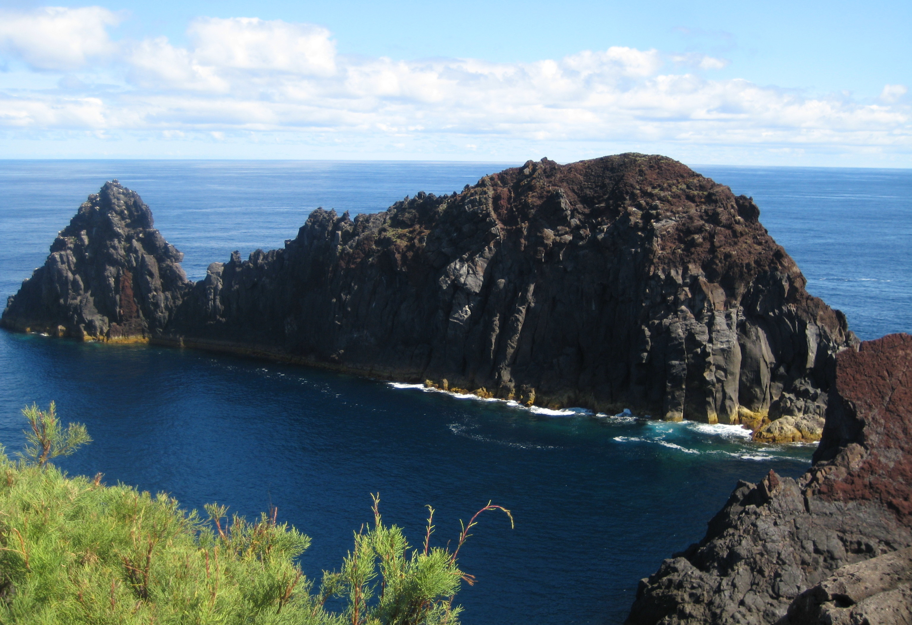 Ilheu de la Ballena, Ponta da Barca